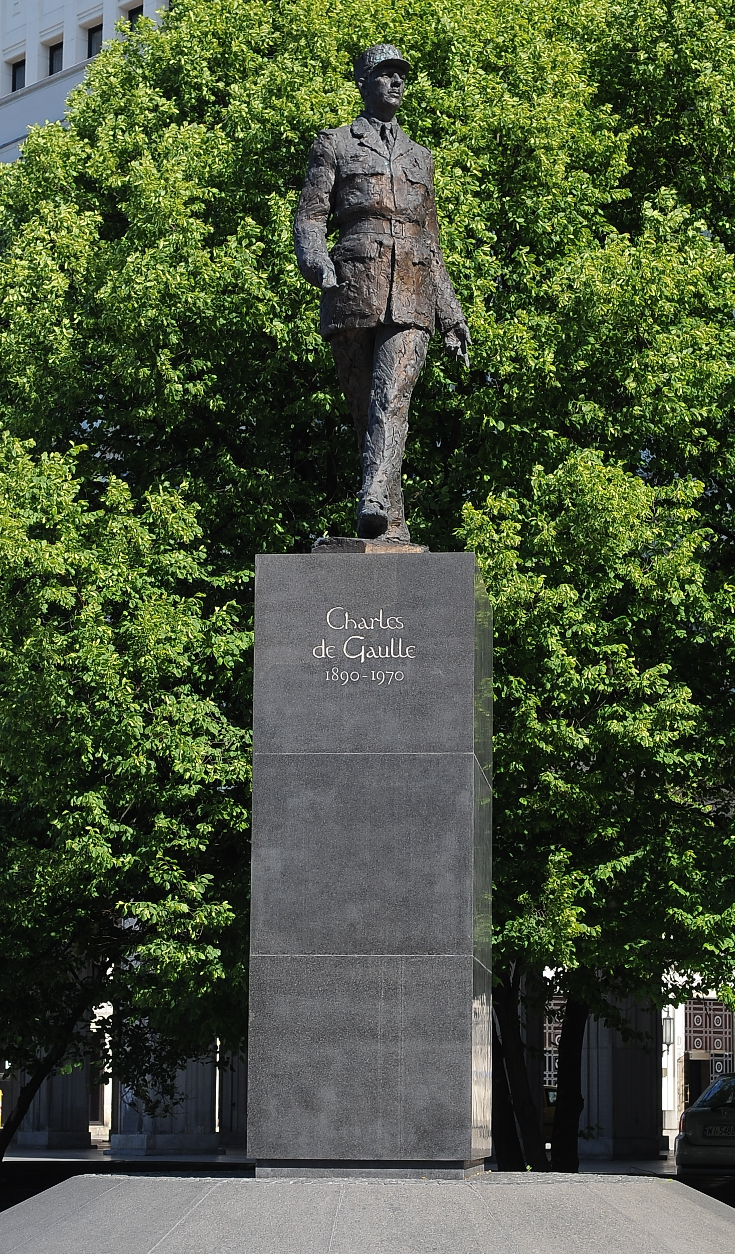 Pomnik Charles'a de Gaulle'a w Warszawie